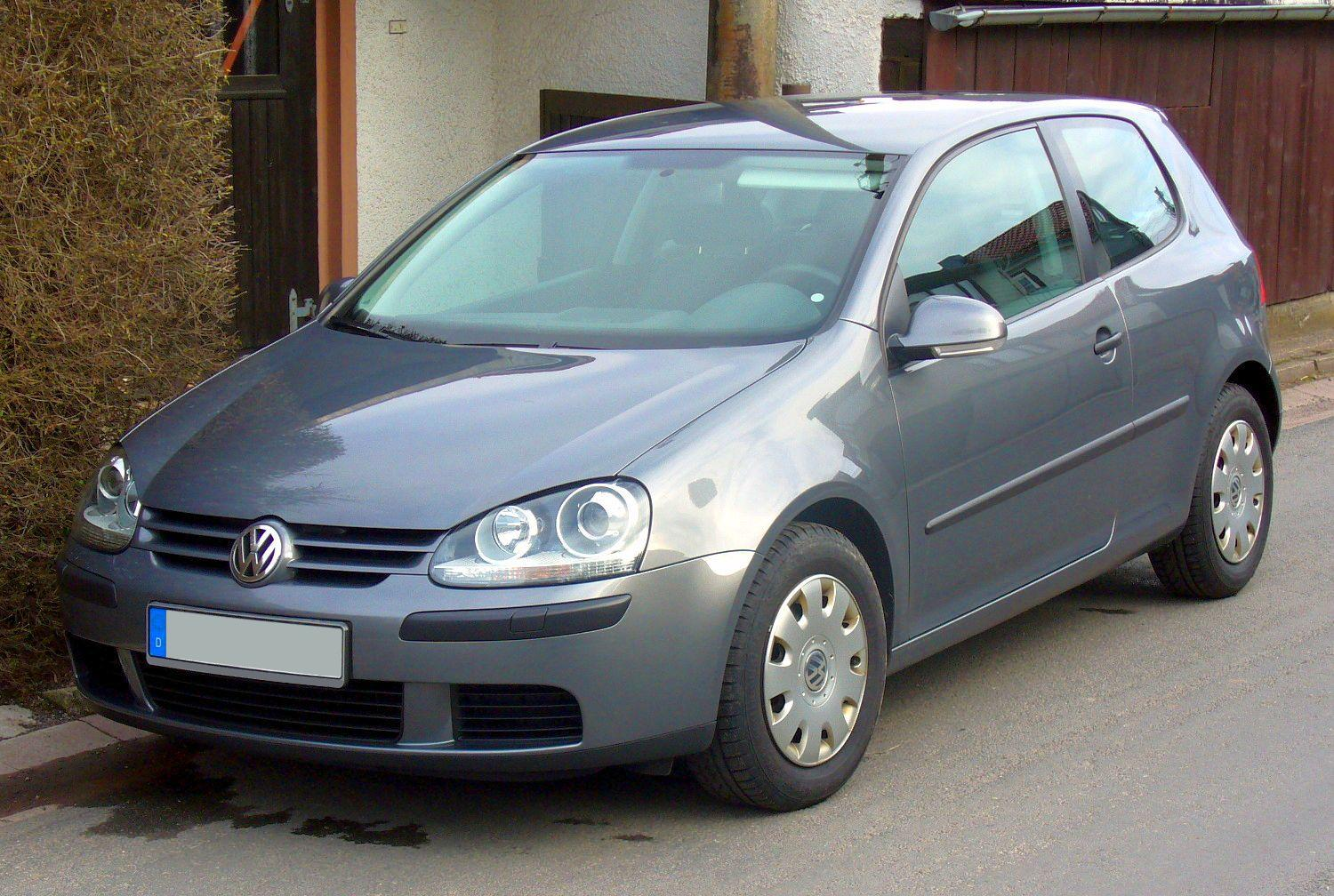 VW Golf V